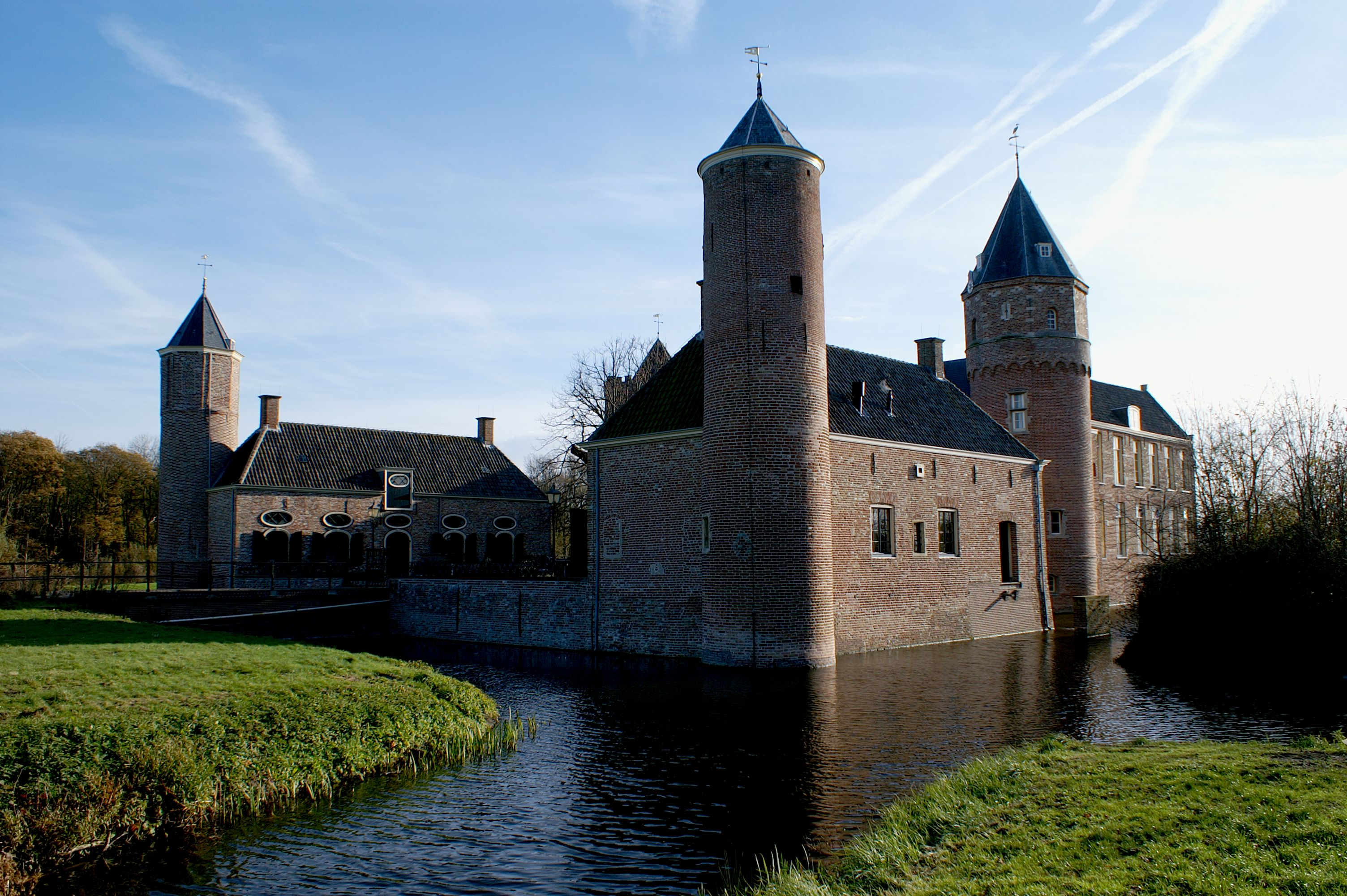 Kasteel Westhove te Oostkapelle met het westelijke bouwhuis op de voorgrond.